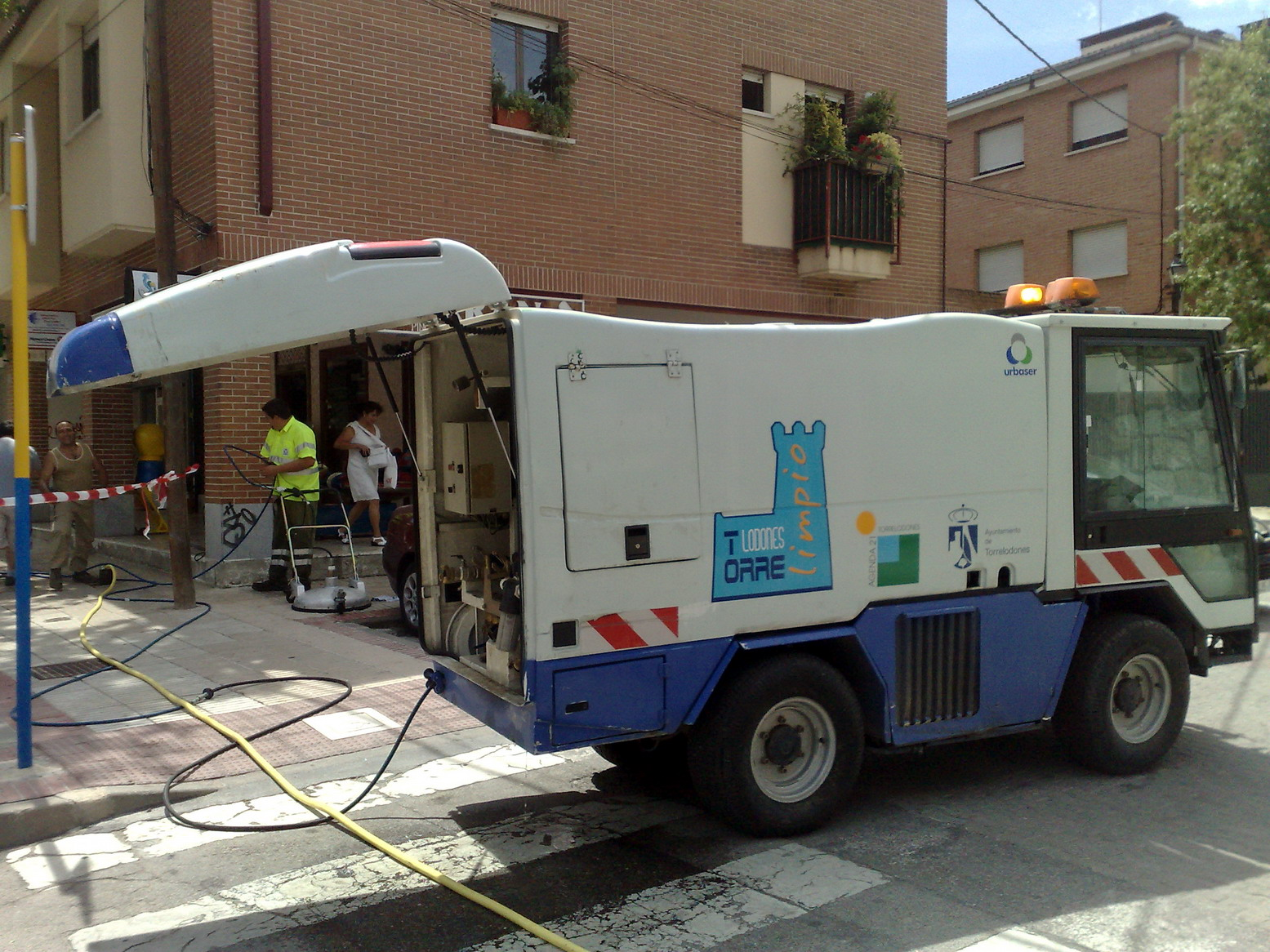 Torrelodones. Servicio de limpieza urbana, actuación en calle Real.